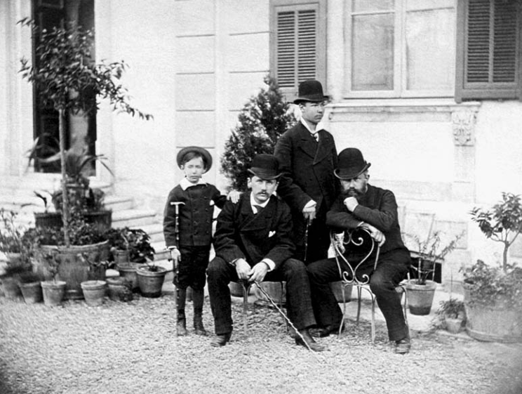 Неизвестный фотограф II половины XIX века. Слева направо: Н. Г. Конради, Модест Чайковский, Алексей Софронов и Пётр Чайковский